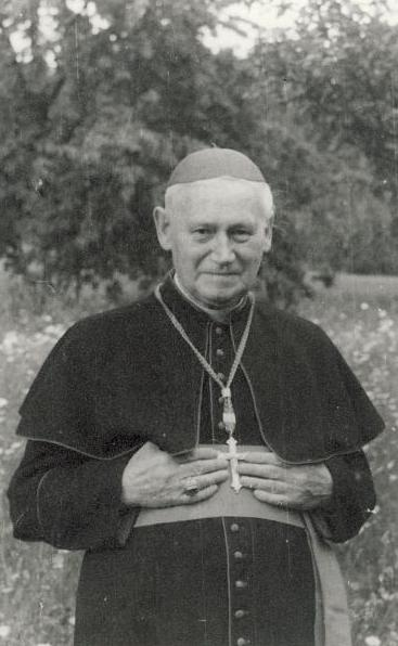 brněnský biskup Karel Skoupý